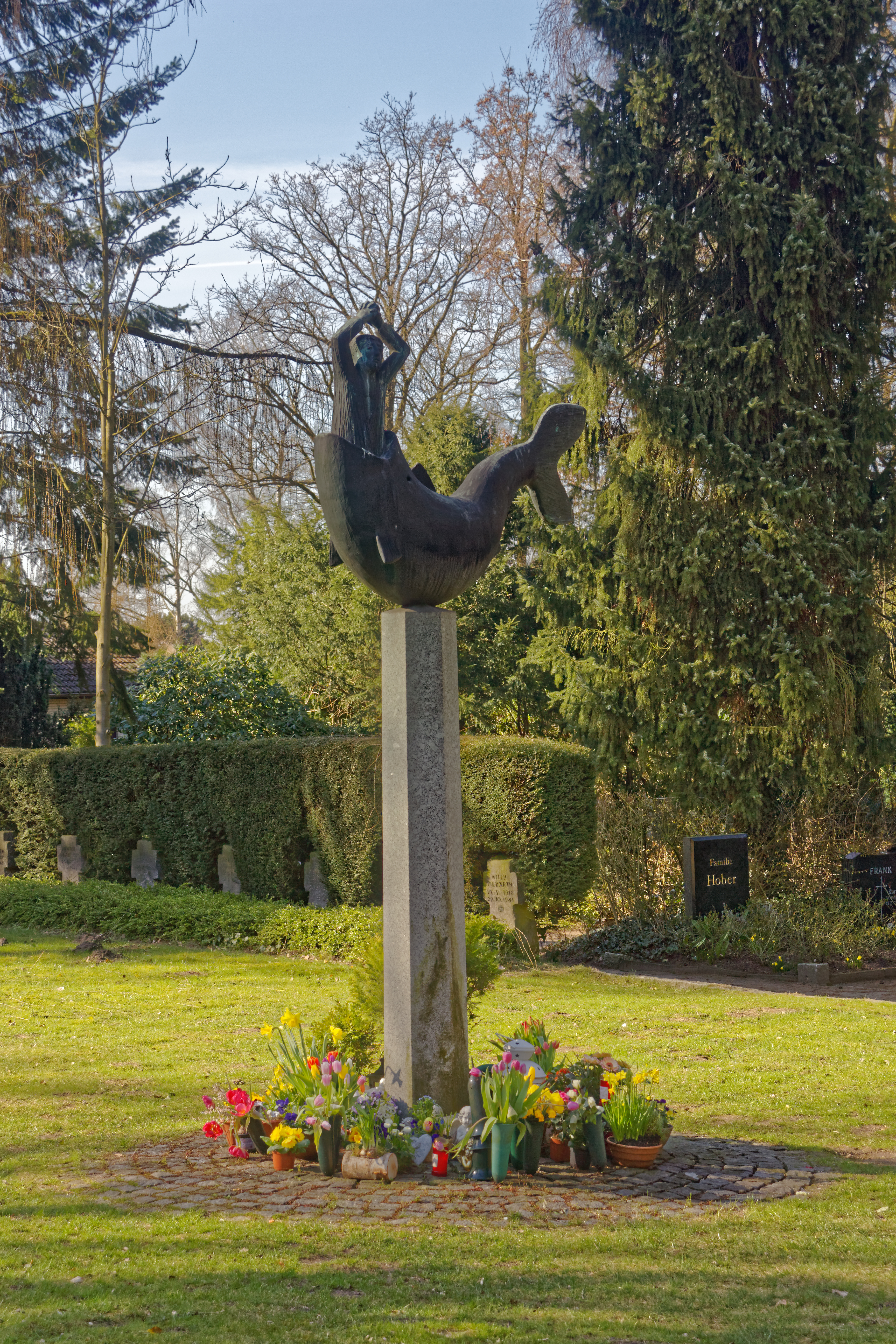 Hamburg-Sülldorf, Friedhof Blankenese, UrnenhainThis is a photograph of an architectural monument.